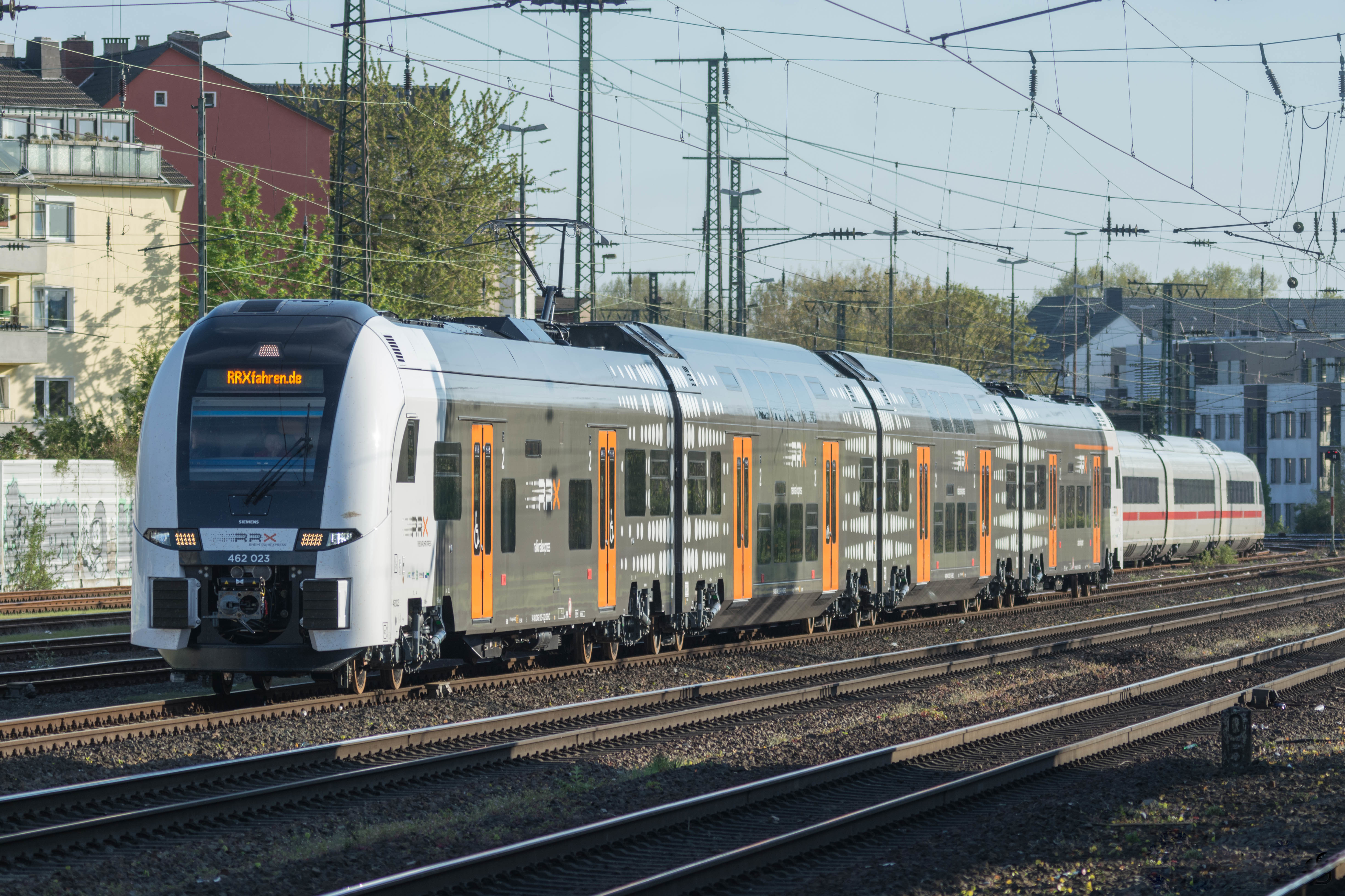 Siemens Desiro HC (Hight capacity) Rhein-Ruhr-Express Koln West